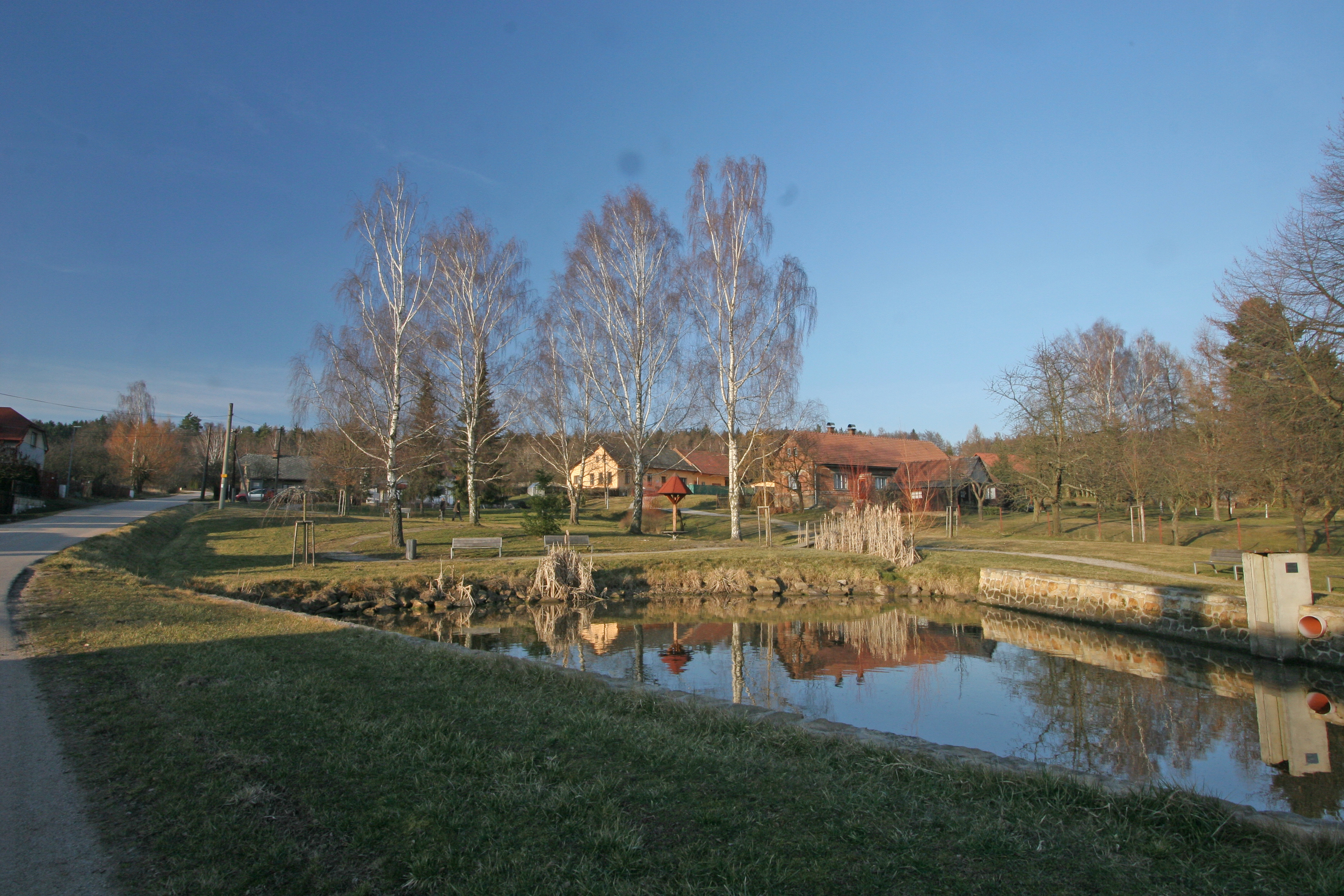 Chloumky u Hořic náves